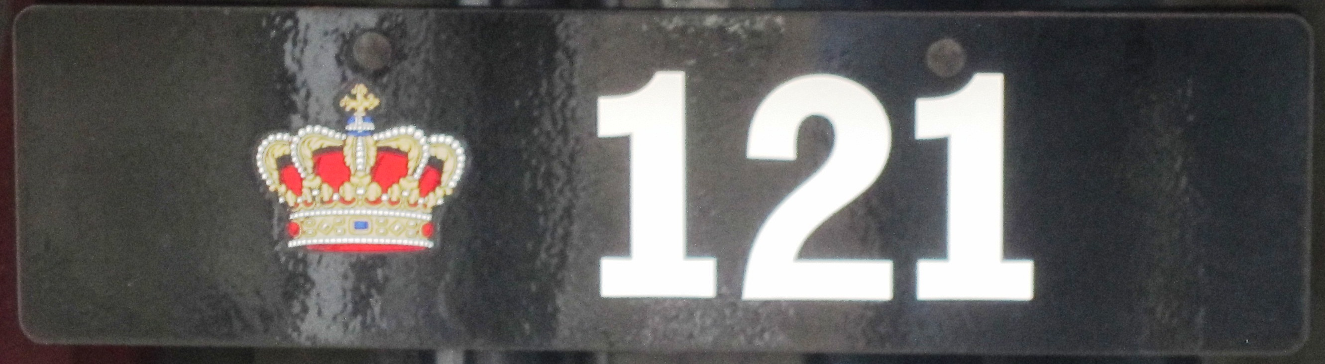 Denemarken kenteken koninklijk 121